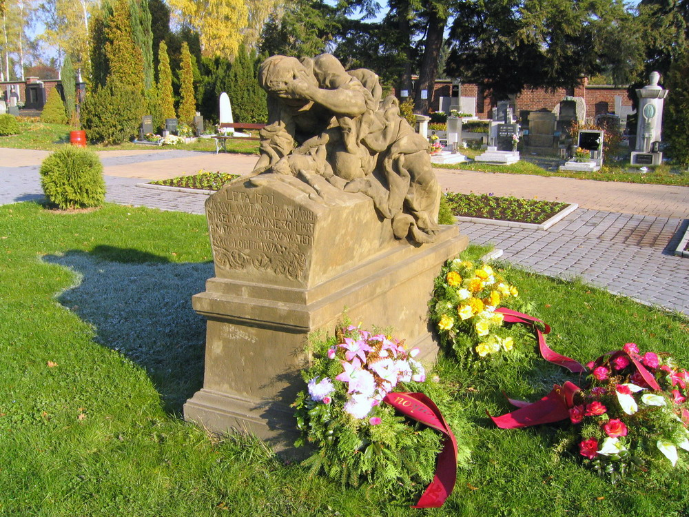 Jaroměř, náhrobek Anny Miseliusové (tchyně M. B. Brauna).